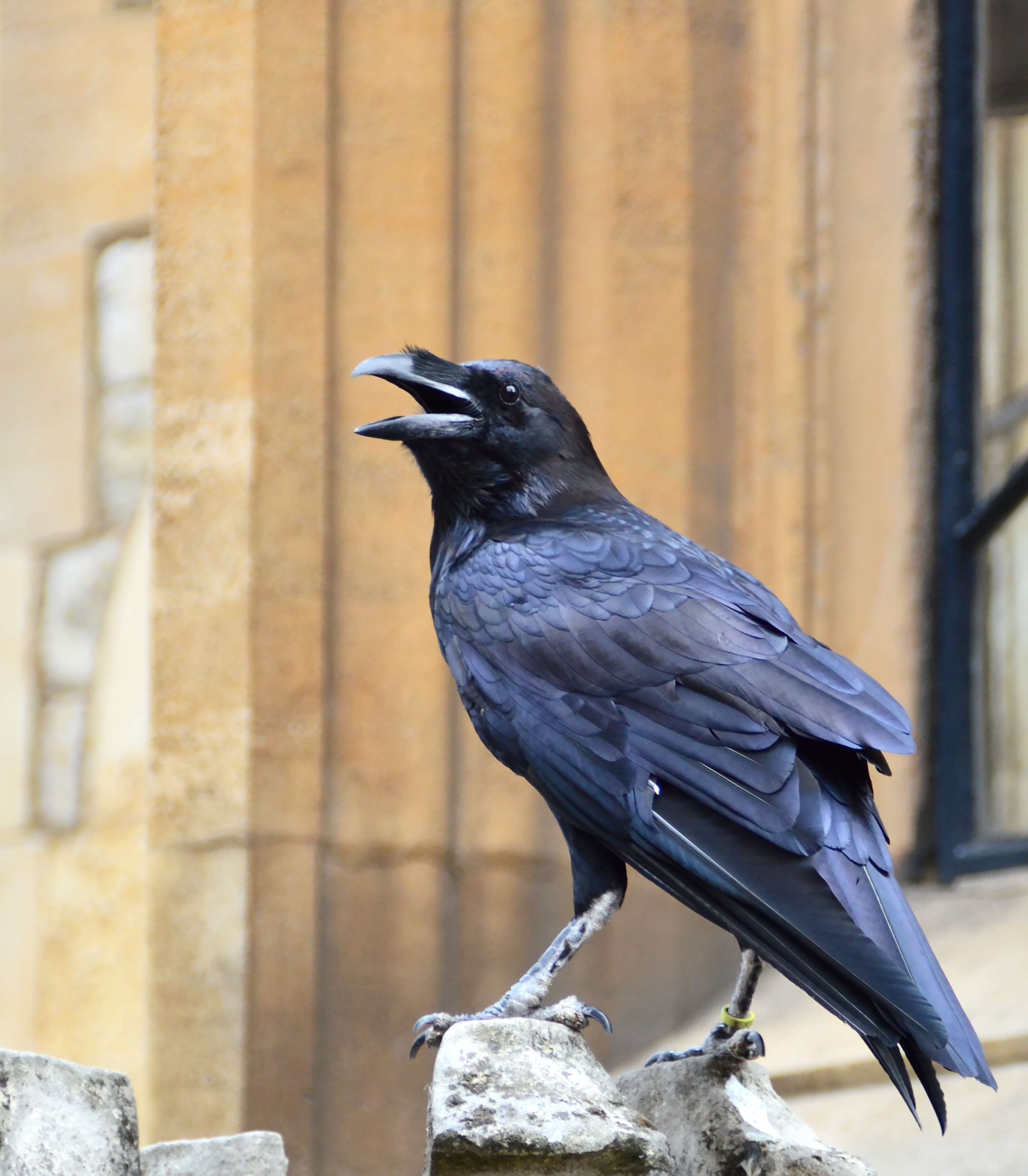 Einer der Towerraben im Tower of London. Es ist deutlich eine gestutzte Flügelfeder zu erkennen.